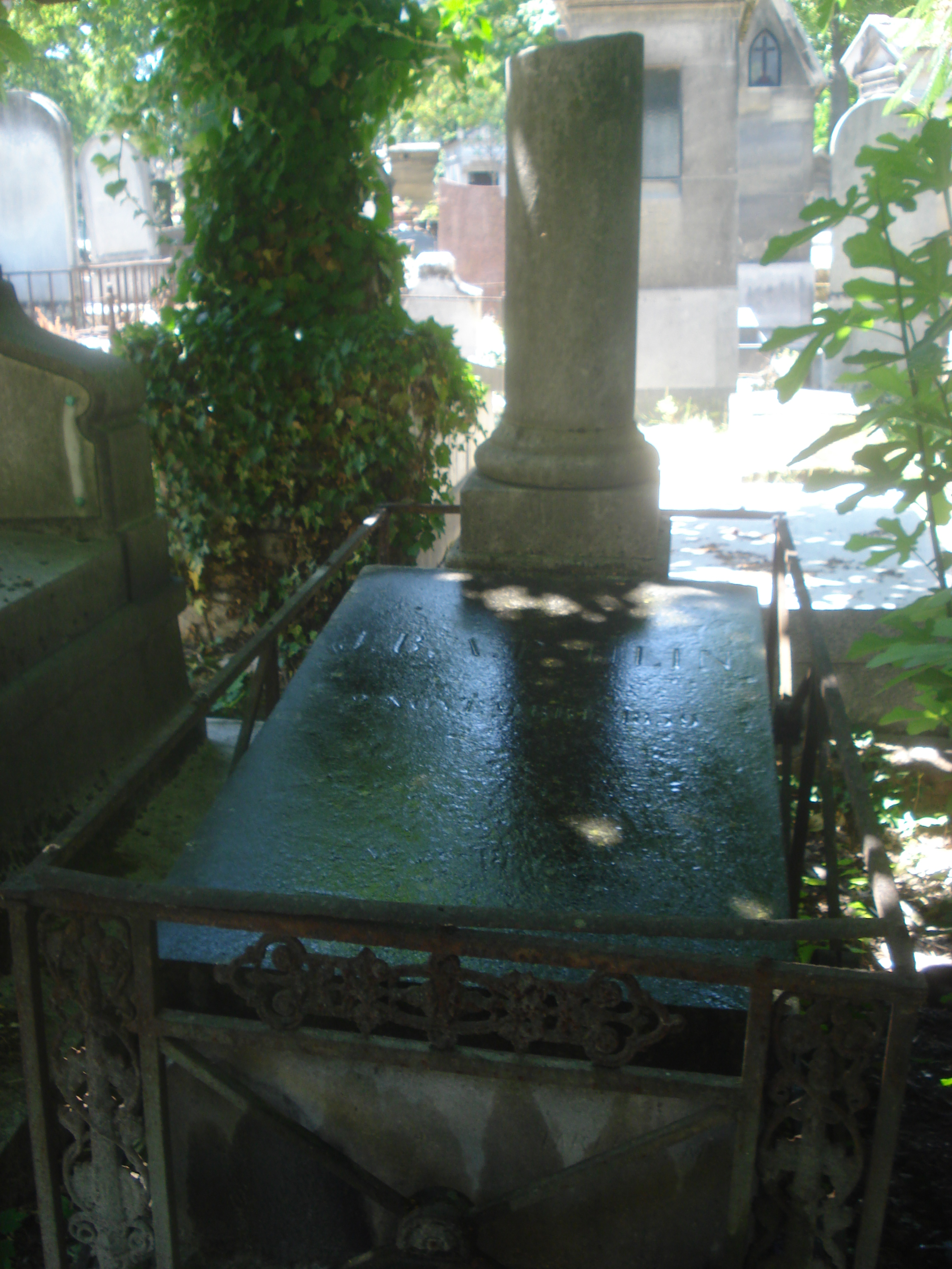 PAULIN Jean-Baptiste-Alexandre, (1796-1859), libraire-éditeur ; journaliste et gérant de journaux. Il est né Nicolas-Jean-Baptiste PAULIN, le 30 prairial an IV (18 juin 1796), à Rizaucourt (Haute-Marne), (vue 232/302). Il est le fils de Jean Paulin, (1761-1825), instituteur, et de Marie-Madeleine-Thérèse Deschamps, (1761-1838), mariés à Éclance (Aube), le 15 juillet de l’an II, (vue 2/303 du registre des mariages). Il a un fils Victor PAULIN, (1834-1868), officier de marine puis journaliste, mort par suicide le 8 novembre 1868 à Paris 9e, (vue 12/31, acte n° 1195), pas de filiation sur l’acte de décès, il est célibataire. Ce fils est inhumé à Montmartre, peut-être dans cette tombe. La tombe est dans la 22e division, 12e ligne, n° 28, avenue Cordier, concession n° 677P-1859, on compte les tombes à partir de l’Ouest, la tombe est sous un arbuste.